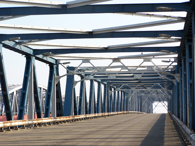 Auteursrechten: J. van Beemen, Zaltbommel